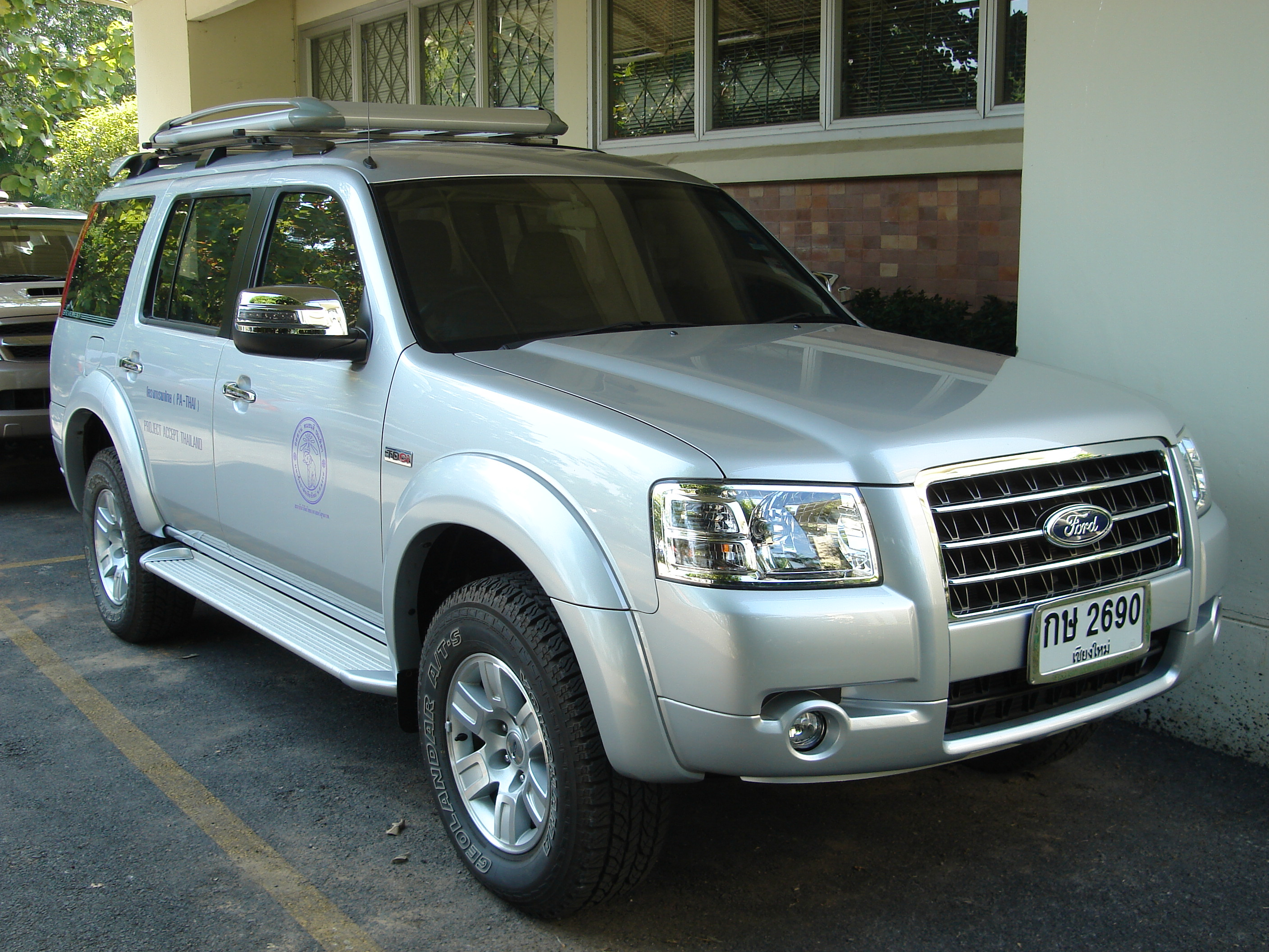 Ford Everest (2nd generation)